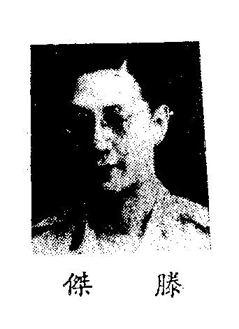 中文（中国大陆）: 制憲國民大會代表